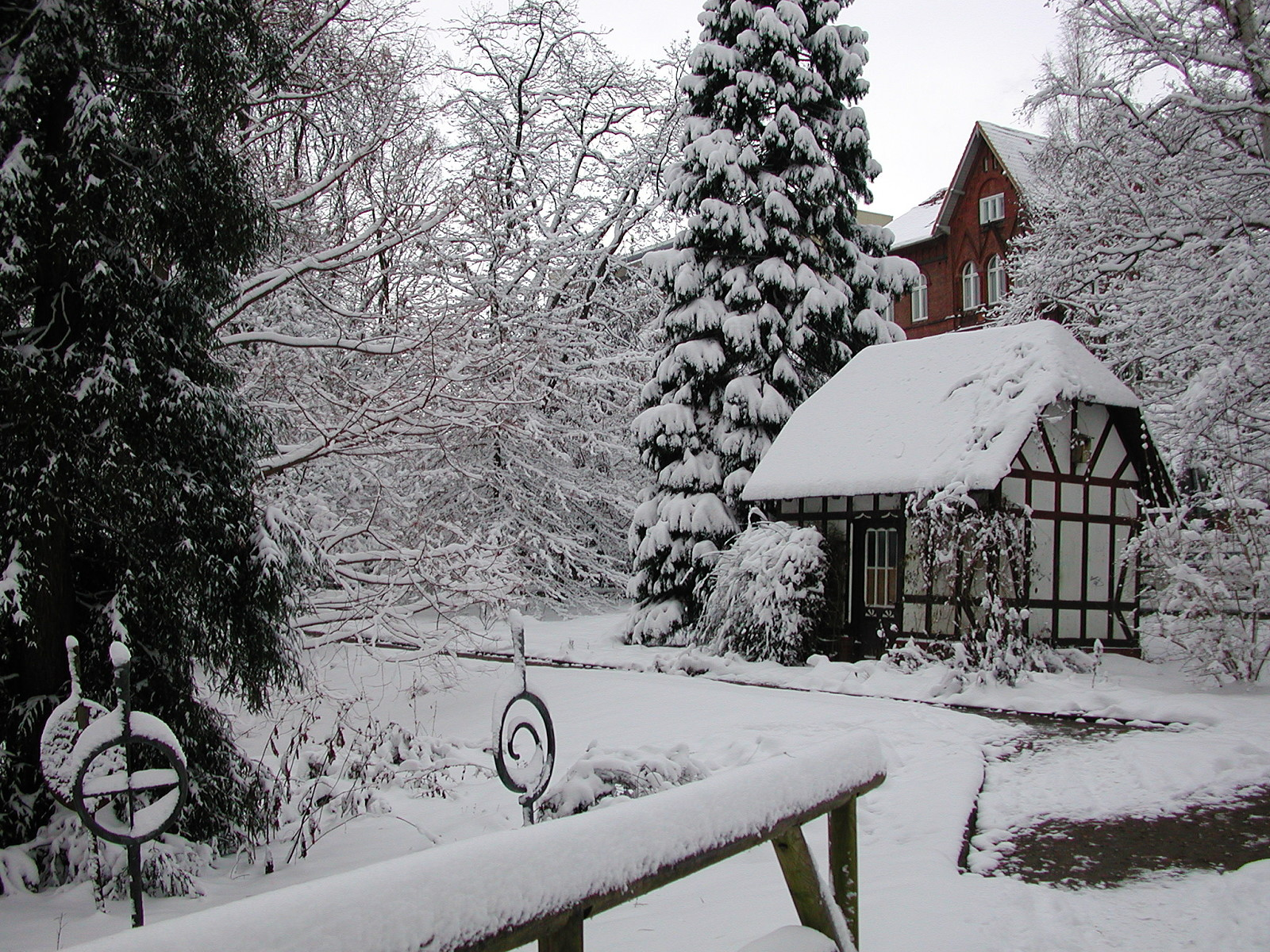 Alter Botanischer Garten Kiel: Blick im Winter auf das Gerätehäuschen neben einem Riesenmammutbaum (Sequoiadendron giganteum).